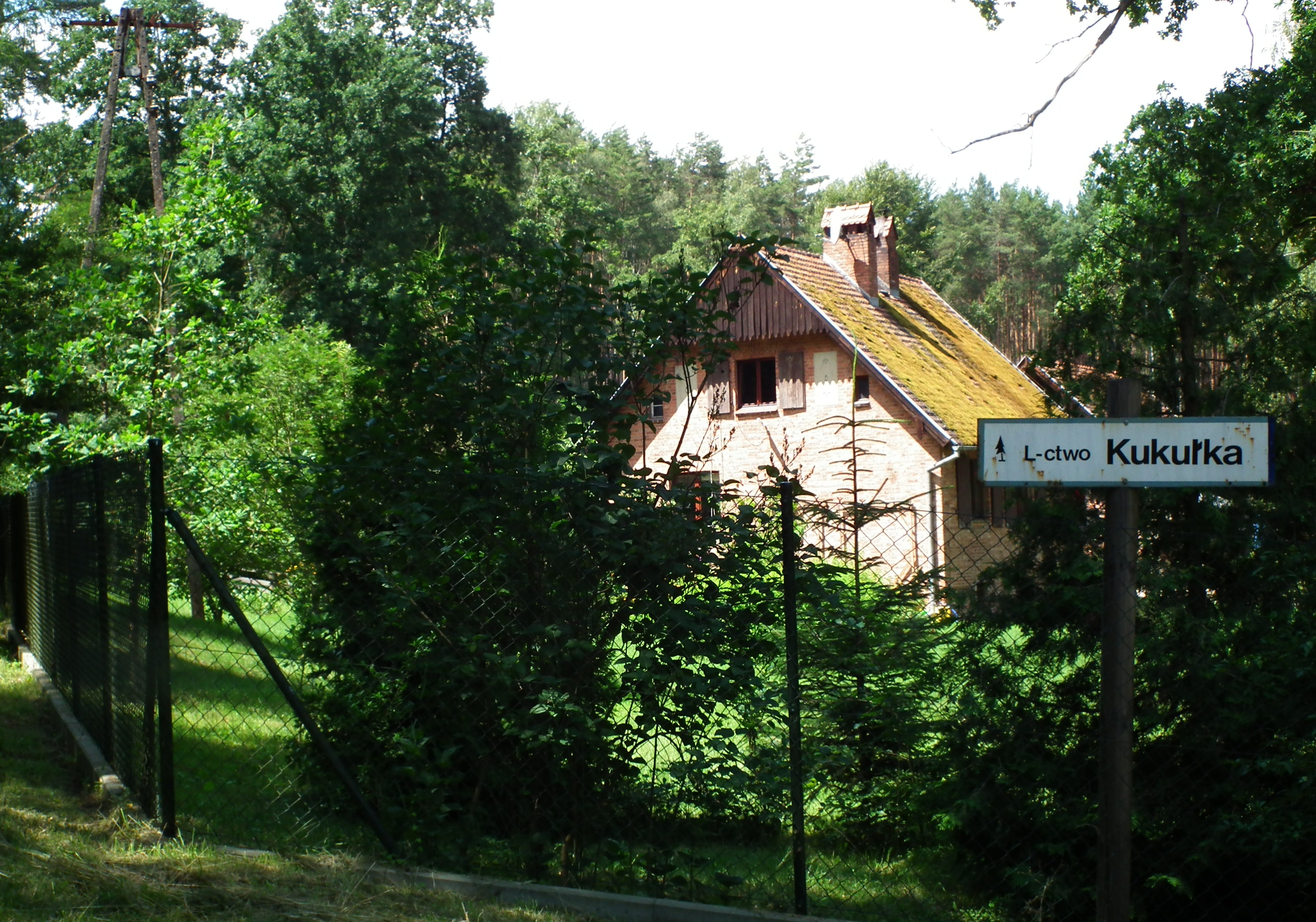 Leśniczówka Kukułka w Puszczy Noteckiej.